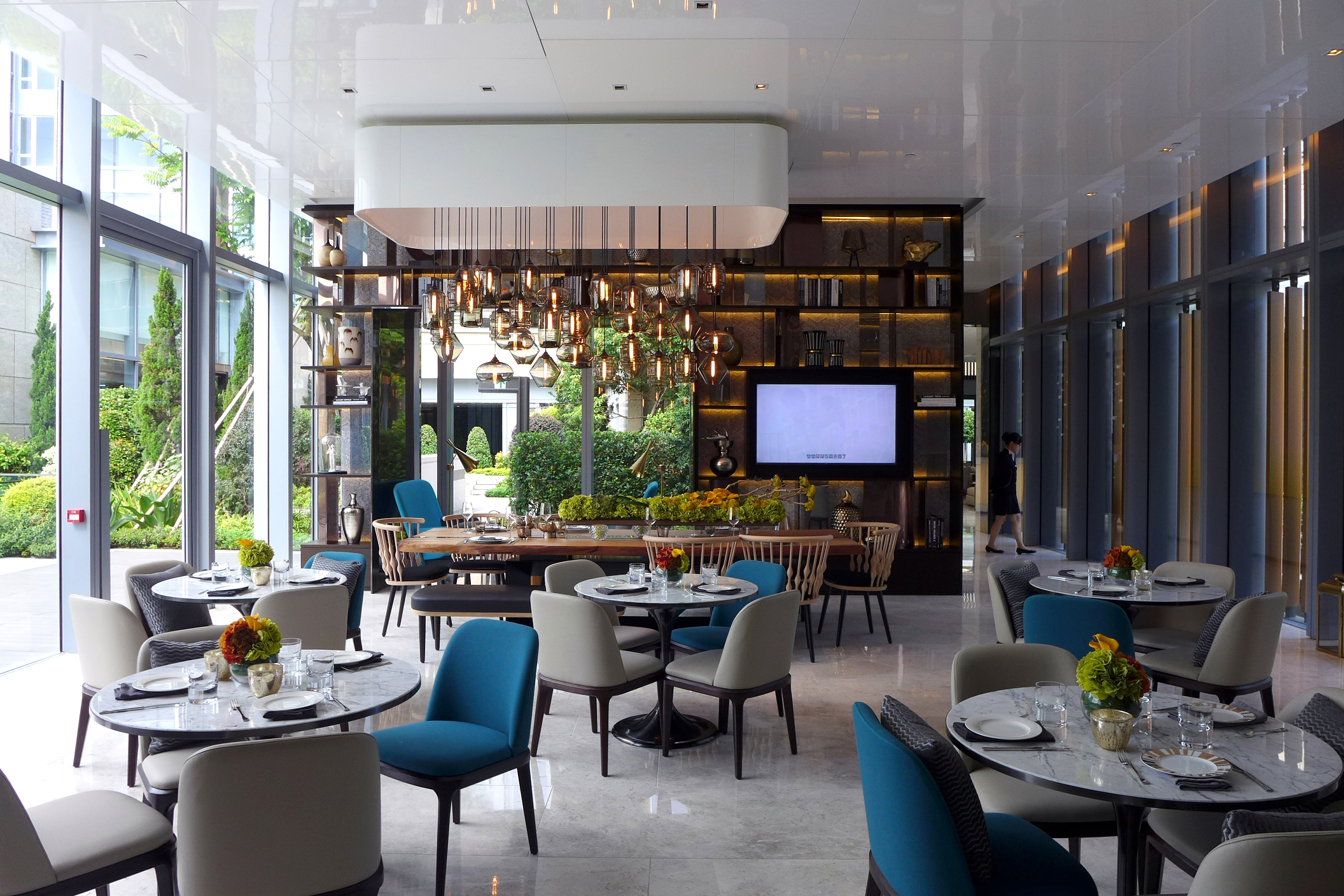 Club COMO Restaurant